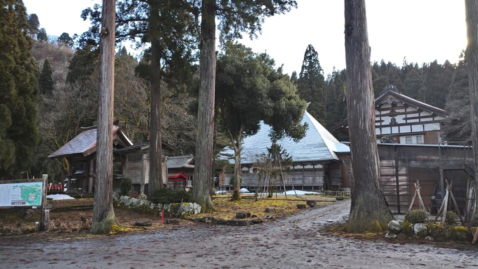 宝林寺 2020-01-11